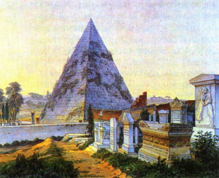 Могила княжны П. П. Вяземской в Риме. 1835. Акварель